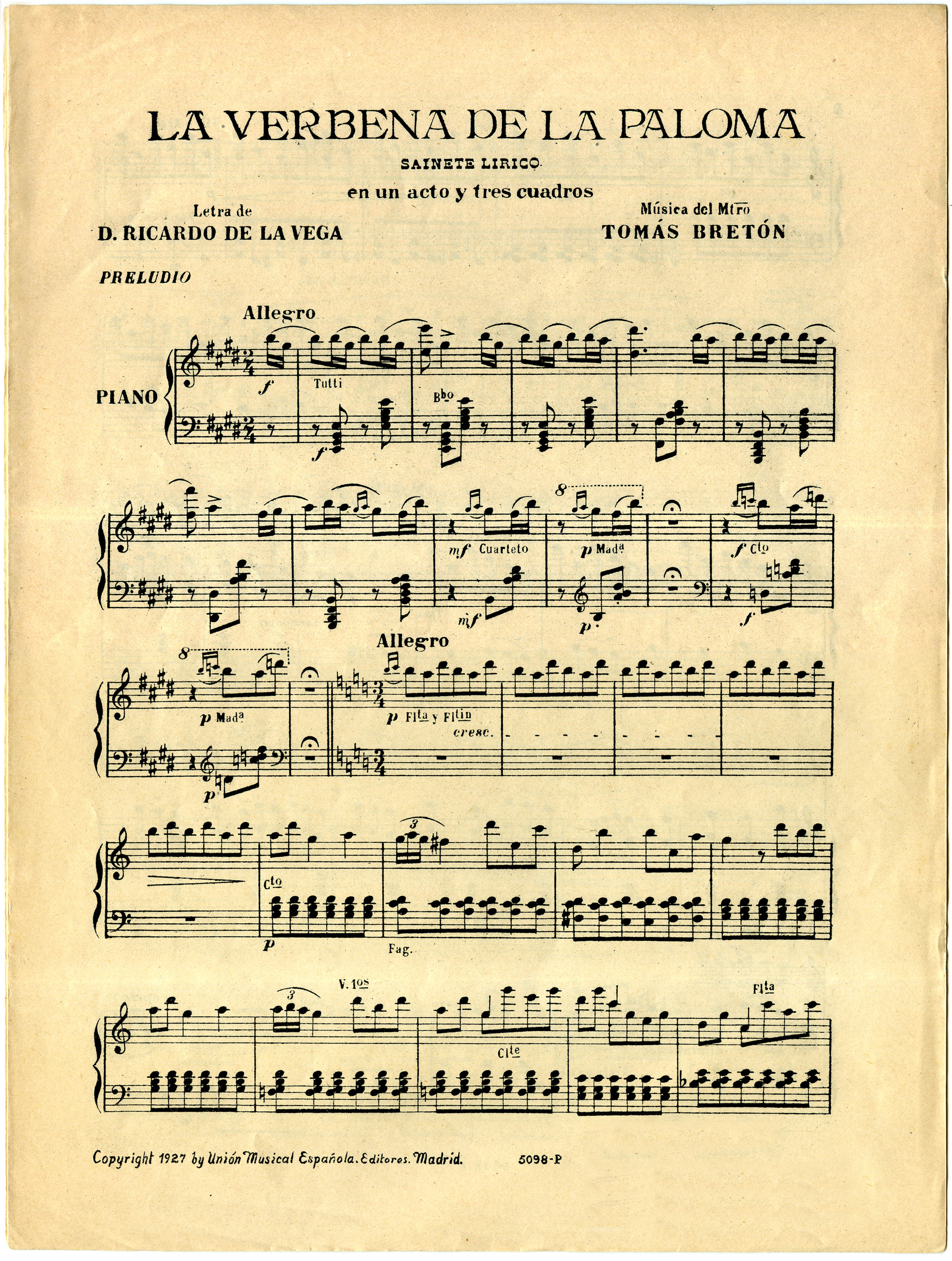 Partitura del Preludio de La verbena de la Paloma de Tomás Bretón.